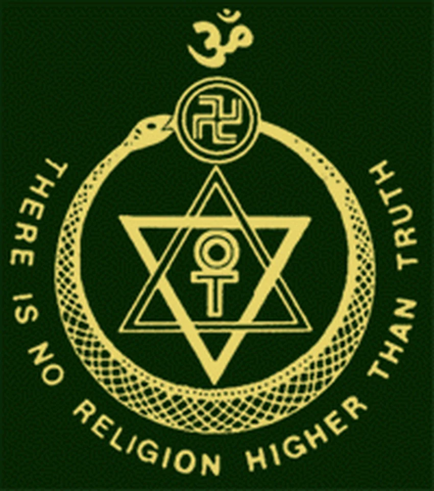 Adyar Емблема на Интернационалното Теософско Общества (Adyar)